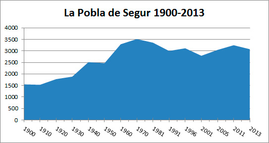 Gráfica de la evolución demográfica de La Pobla de Segur